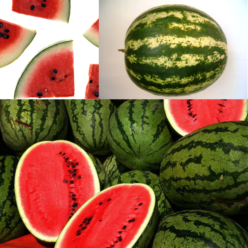 Grafika podręcznika Wikijunior:Owoce. Arbuz zwyczajny (Citrullus lanatus).